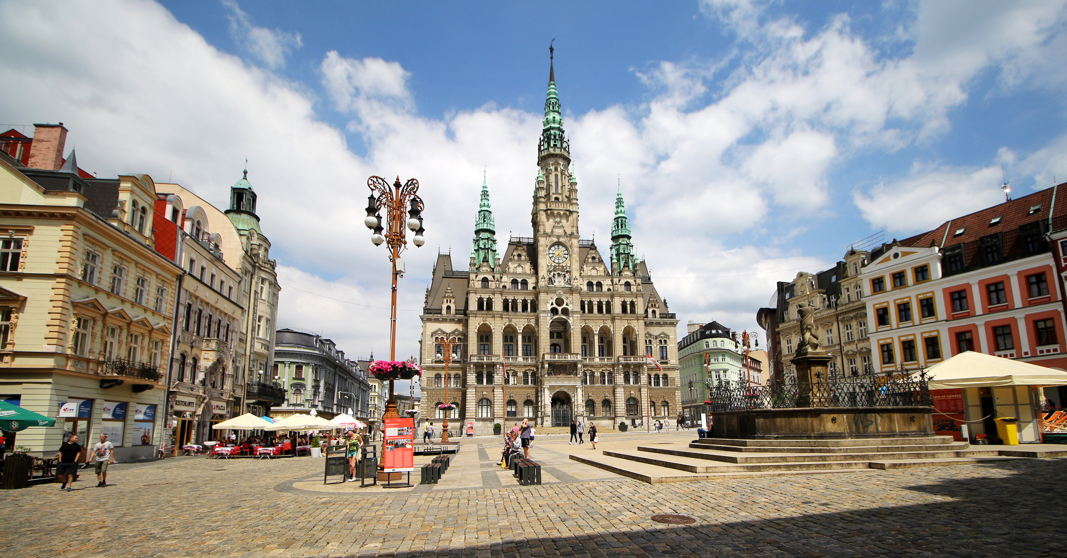 Liberecká radnice